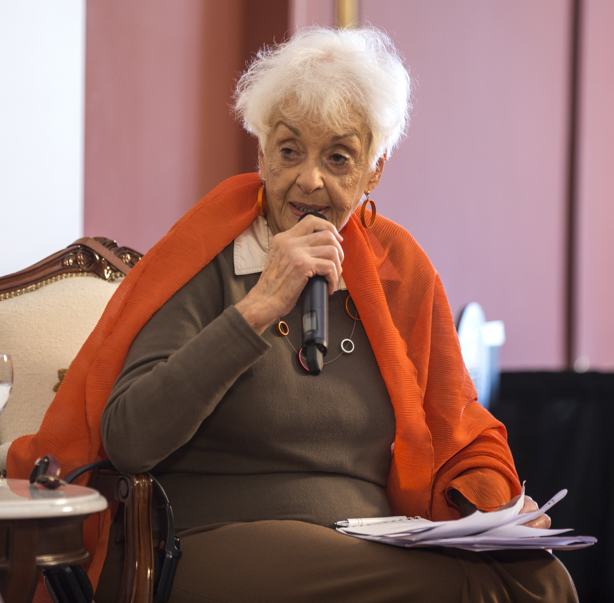 Buenos Aires, 3 de Octubre de 2016 En la Casa Rosada se llevan a cabo los Diálogos Globales, un seminario organizado por la Secretaría de Integración Federal y Cooperación Internacional del Ministerio de Cultura de la Nación. El encuentro se lleva a cabo en el Salón de los Pueblos Originarios de la Casa Rosada y participan oradores expertos en temas de diálogo intercultural y reconciliación pos-conflicto. La apertura del Seminario estuvo a cargo del Jefe de Gabinete, Marcos Peña, el ministro de Cultura de la Nación, Pablo Avelluto y el secretario de Integración Federal y Cooperación Internacional, Iván Petrella. Fotos: Silvina Frydlewsky / Ministerio de Cultura de la Nación